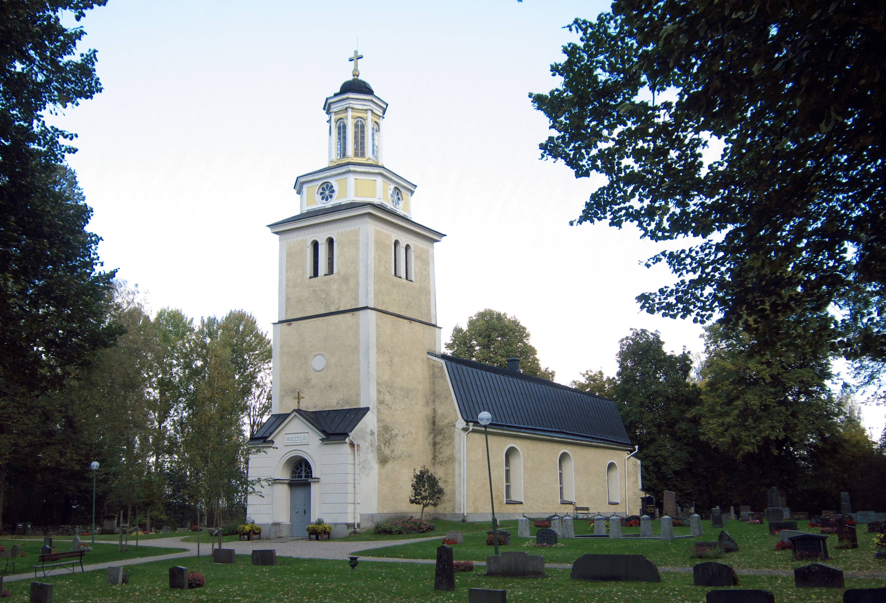 Bro kyrka, Västerås stift